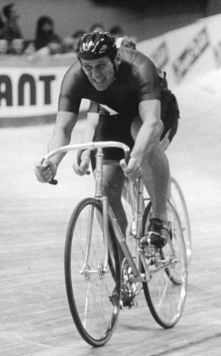 Werner Otto ADN-ZB Oberst 7.1.89 Berlin: Solidaritätsrennen auf der Winterbahn - Ehemalige Prominente des Radsports beteiligten sich am Wochenende an einer Sonderveranstaltung auf der Berliner Winterbahn der Werner-Seelenbinder-Halle, deren Erlös auf das Solidaritätskonto zugunsten der Erdbebenopfer in Armenien überwiesen wird. Werner Otto, ehemaliger Weltmeister im Tandem mit Jürgen Geschke führt hier das FEld über 20 TEmporunden an. Werner Otto ist heute Trainer beim SC Dynamo Berlin.